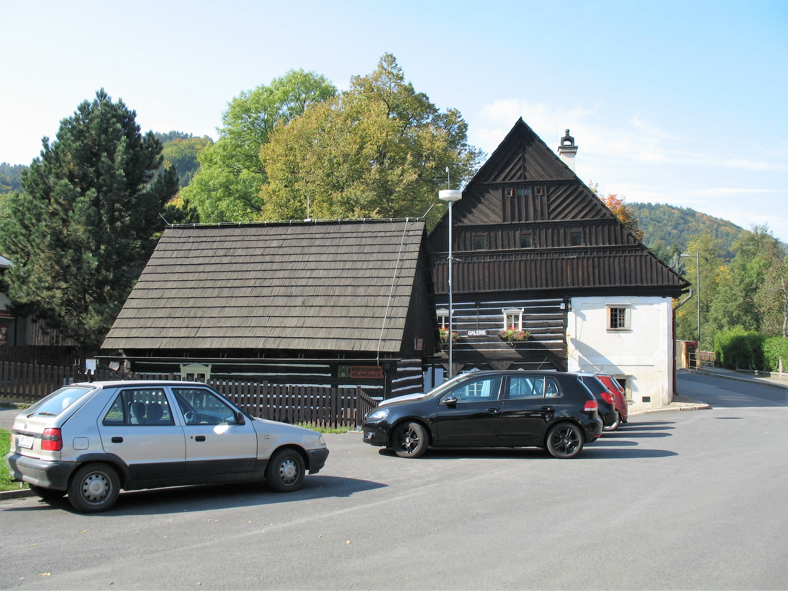 Boučkův statek ve Vranovém (Malá Skála. Liberecký kraj)